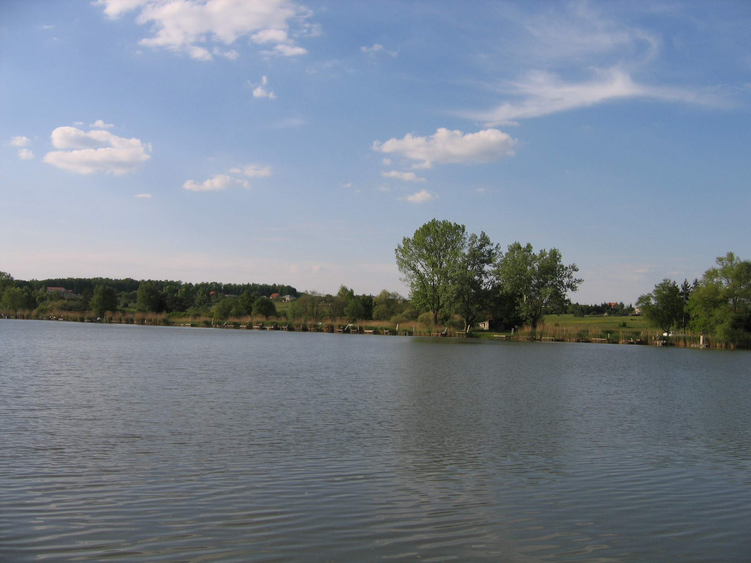 Etang de Farschviller 30-04-2007.jpg Oeuvre personnelle mai 2007 JP HOFFMANN Permission du détendeur du copyright